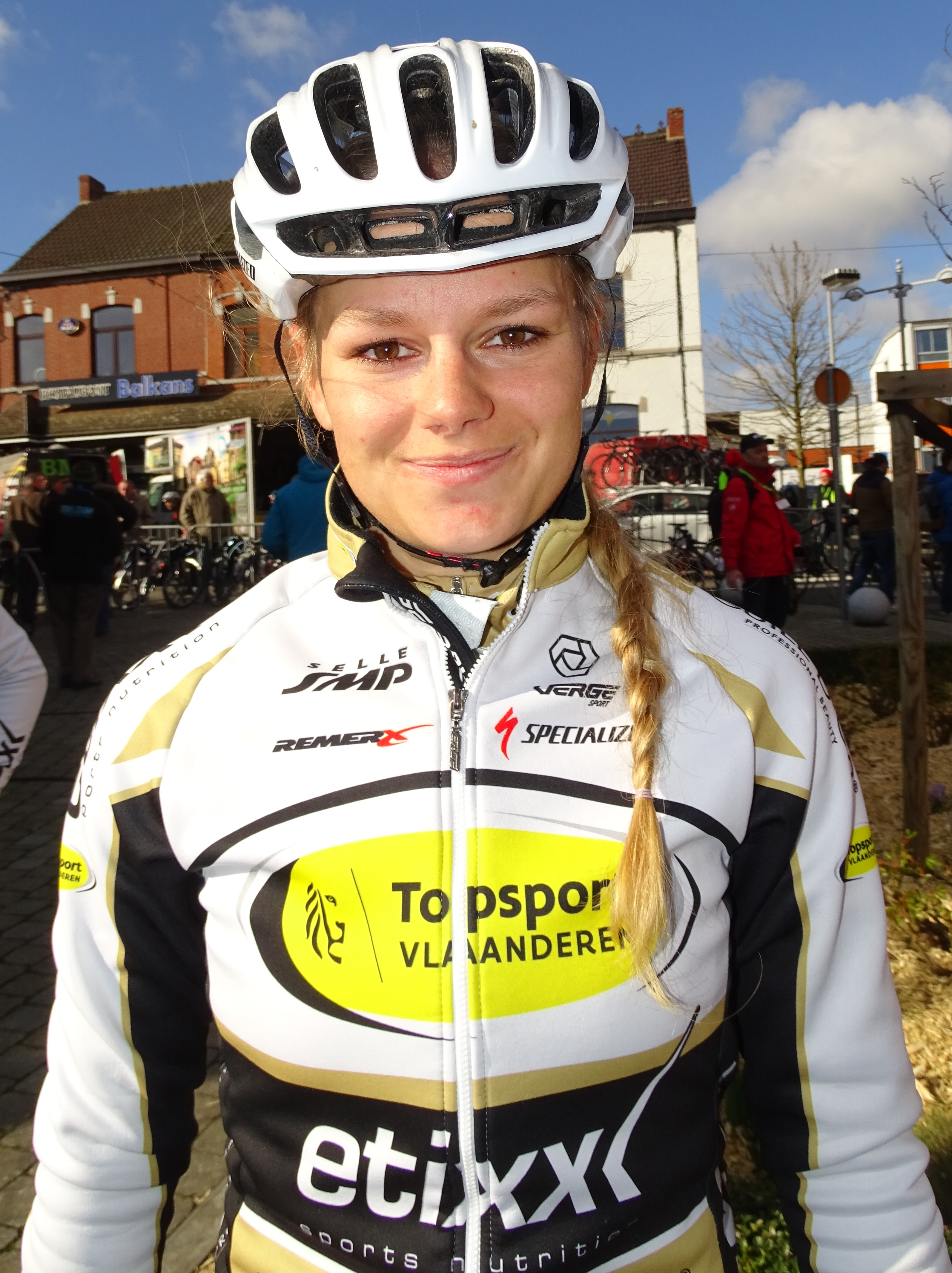 Reportage réalisé le mercredi 2 mars à l'occasion du départ du Samyn des Dames 2016 et du Samyn 2016 à Quaregnon, Belgique.